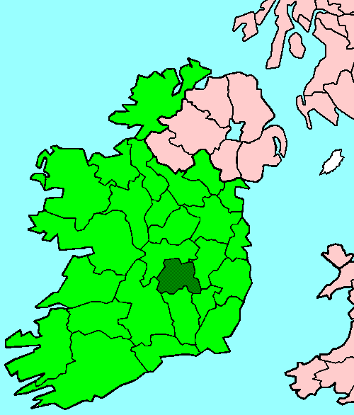 Laois